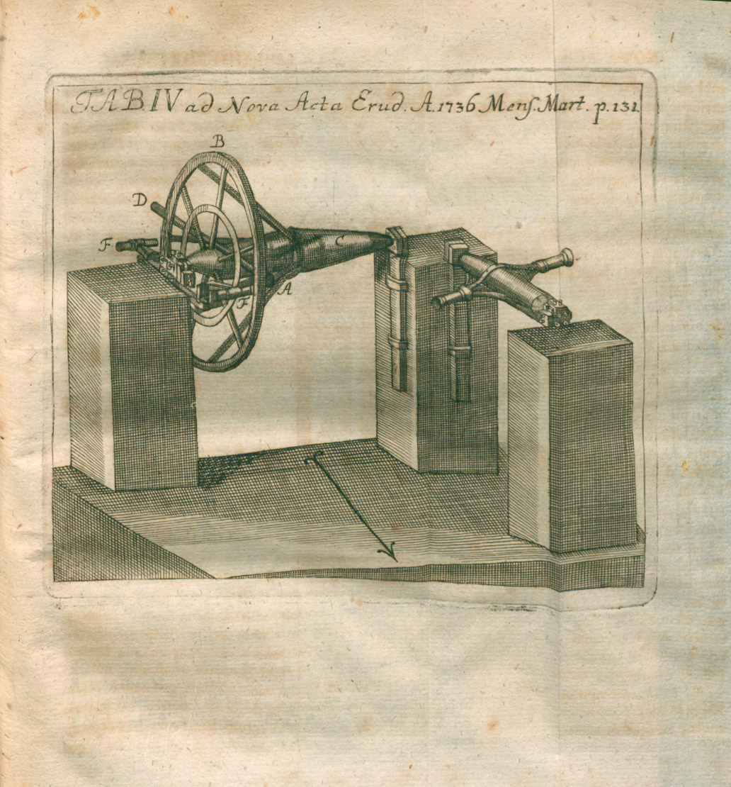 Illustration